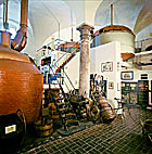 Hauseigenes Braumuseum Aldersbach